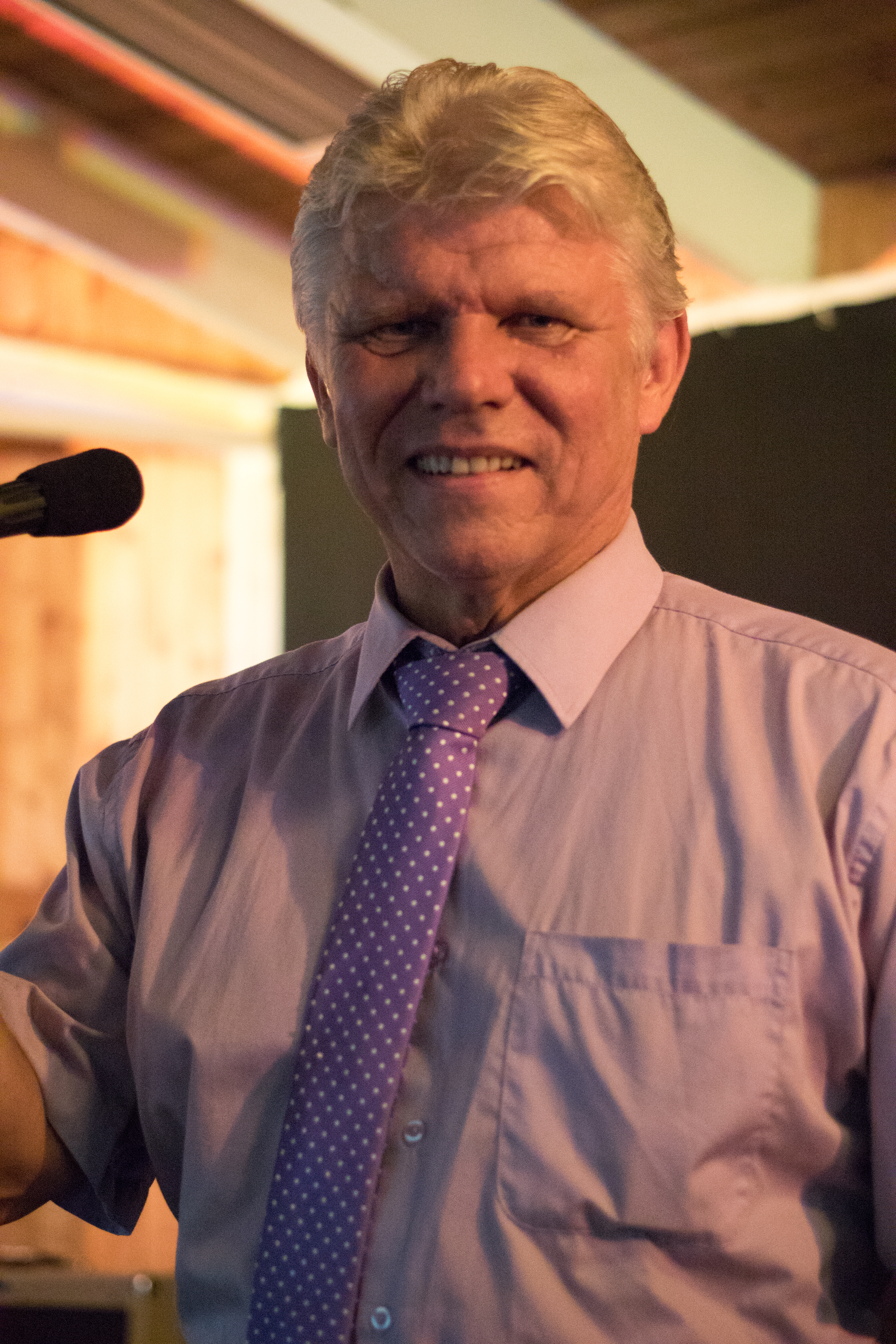 Teuvo Oinas suomalainen laulaja